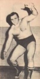 Gorilla Monsoon dans un programme de catch du 25 janvier 1975